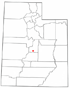 Localización de Mayfield, Utah